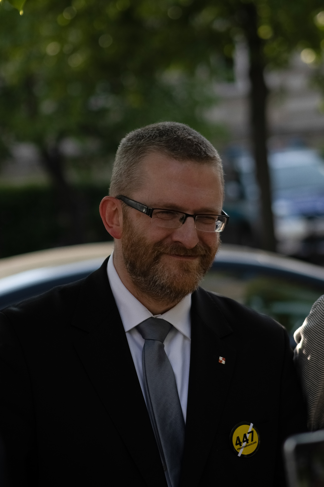 Grzegorz Braun na proteście przeciwko amerykańskiej ustawie 447 (maj 2019)